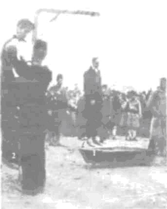 Иван Жилев (обесеният на втори план) и Димитър Трендафилов (на преден план).